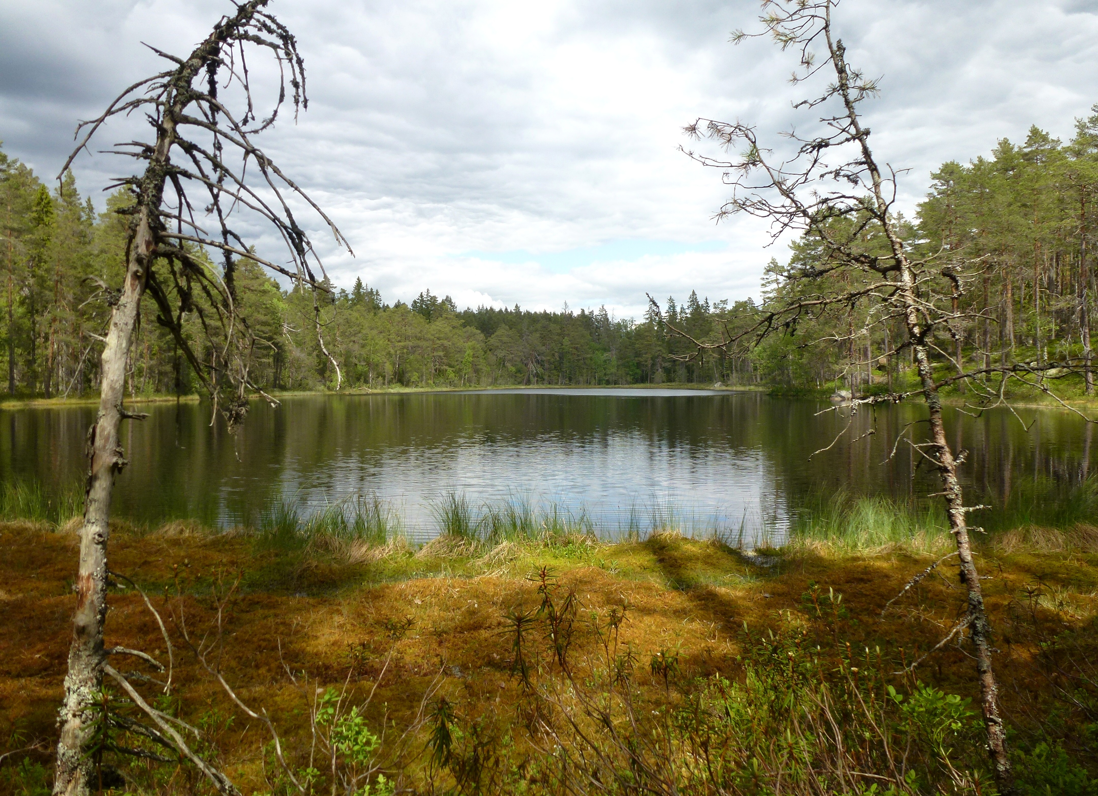 Norra Kvills nationalpark, Stora Idgölen